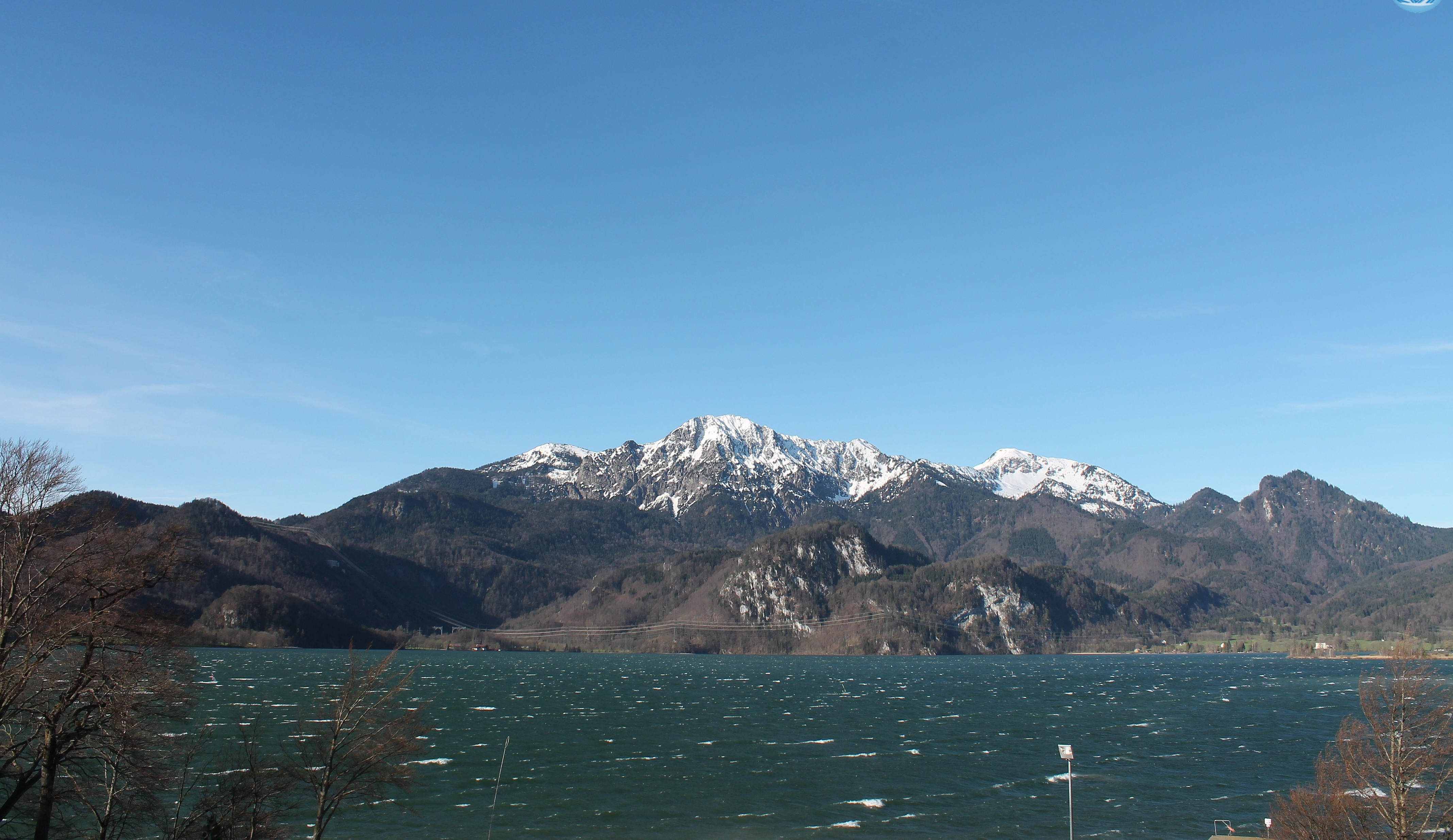 7 bis 8bft am Kochelsee